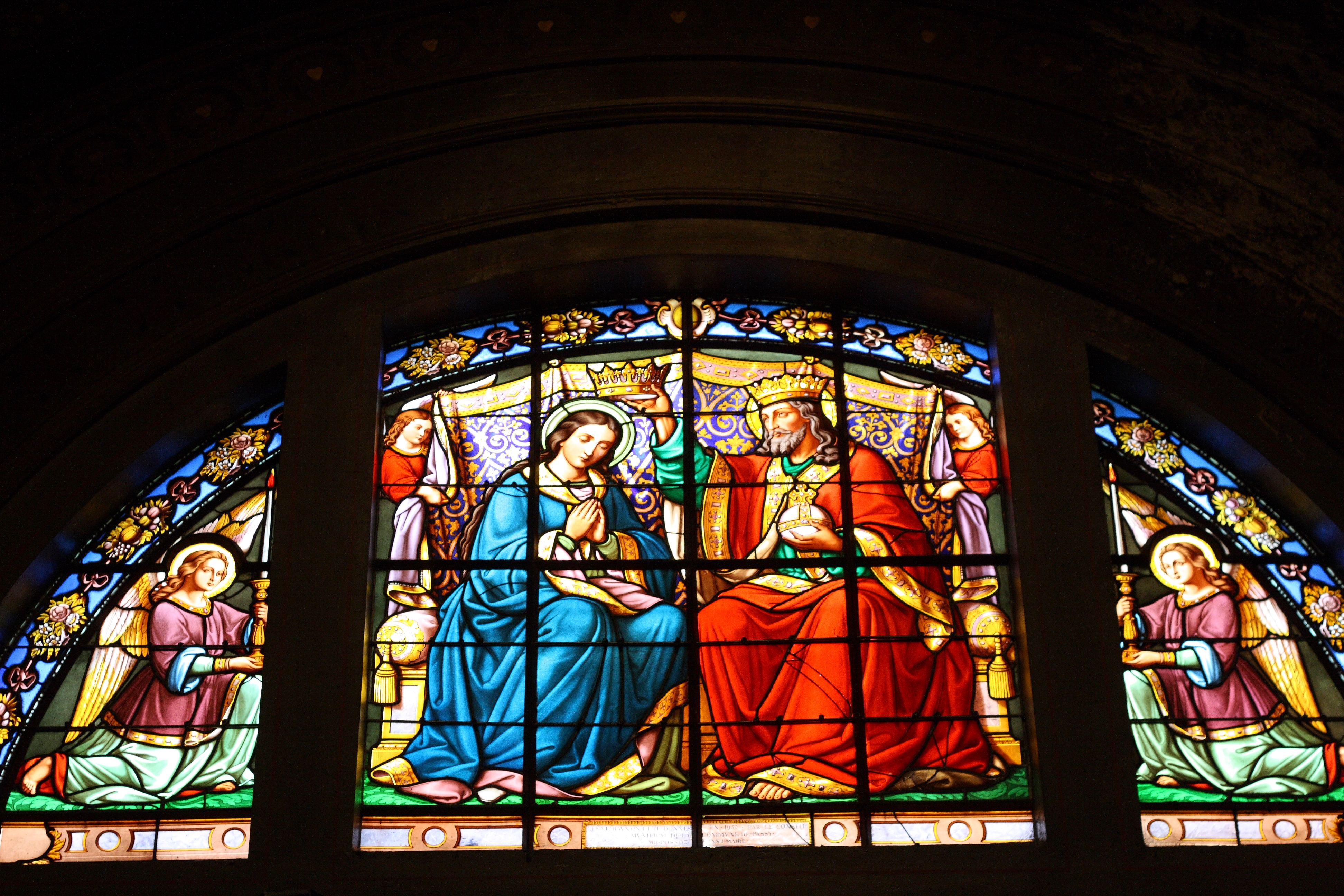 Katholische Pfarrkirche Notre-Dame-de-Grace de Passy, 10, rue de l'Annonciation im 16. Arrondissement von Paris, Bleiglasfenster, Darstellung: Krönung Mariens